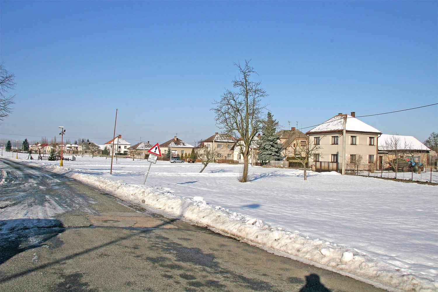 Pohled na náves v obci Kobylice